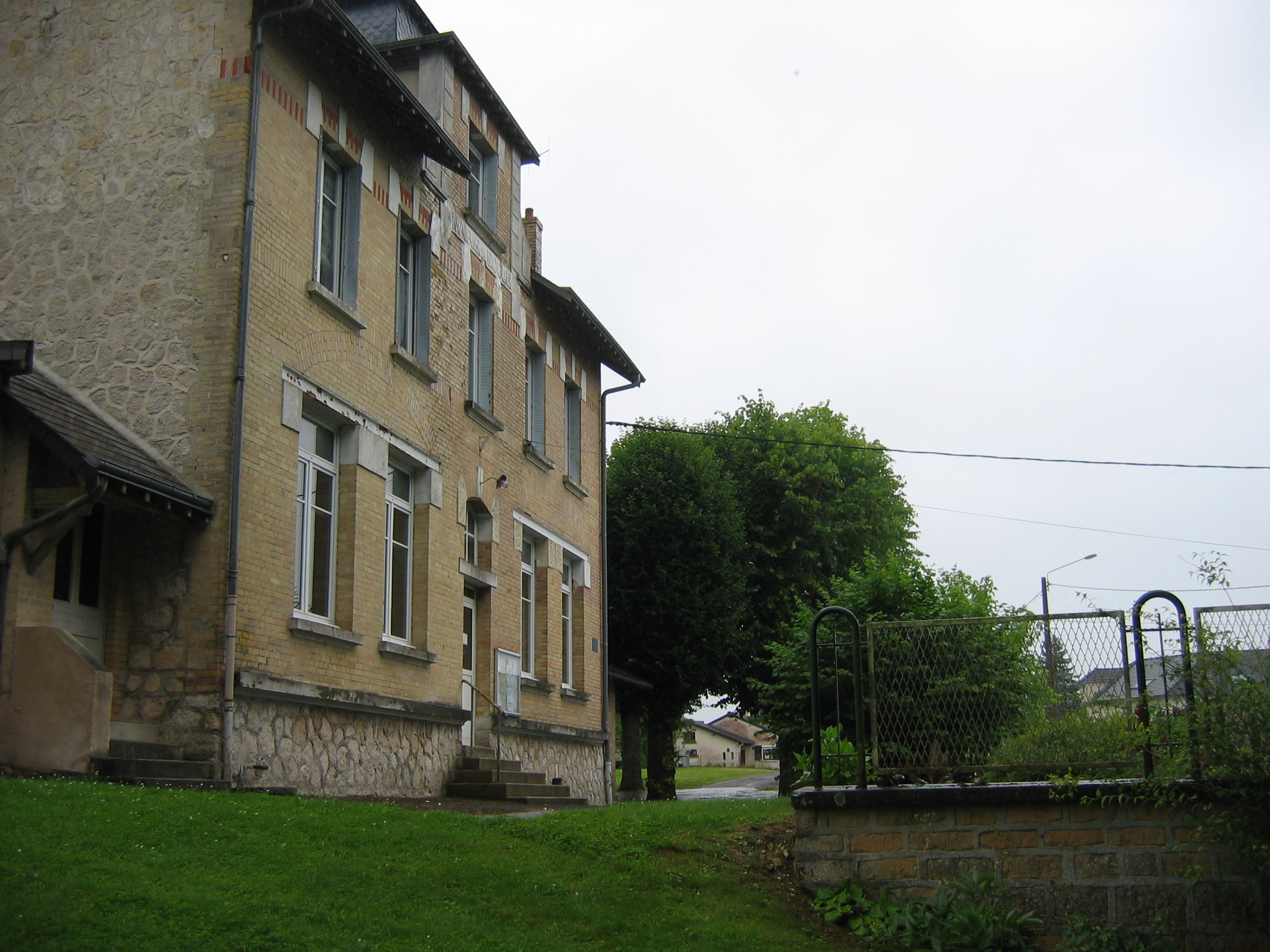 Nanteuil-sur-Aisne, Ardennes France